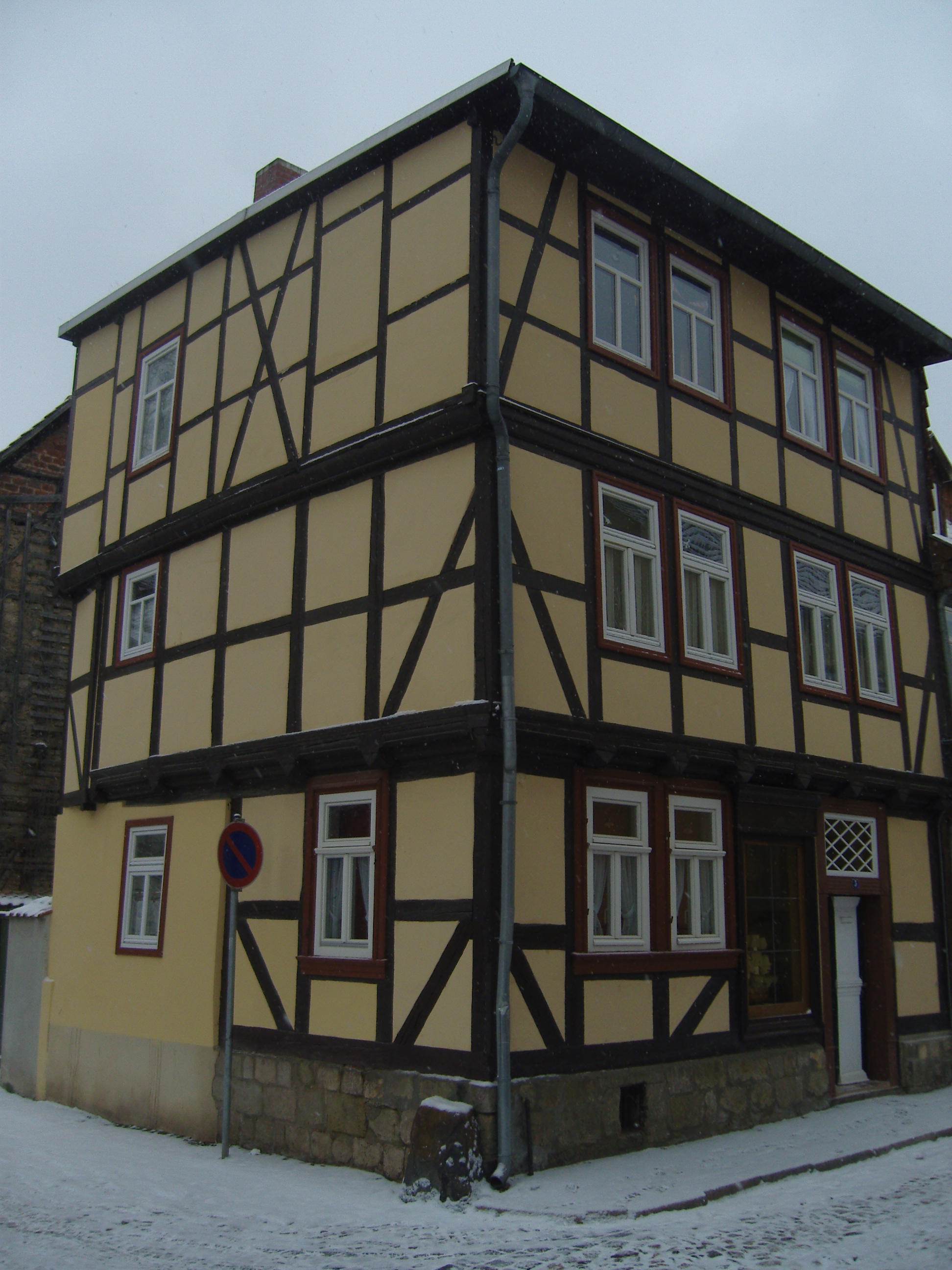 Denkmalgeschütztes Fachwerkgebäude in der Schulstraße 5 in Quedlinburg